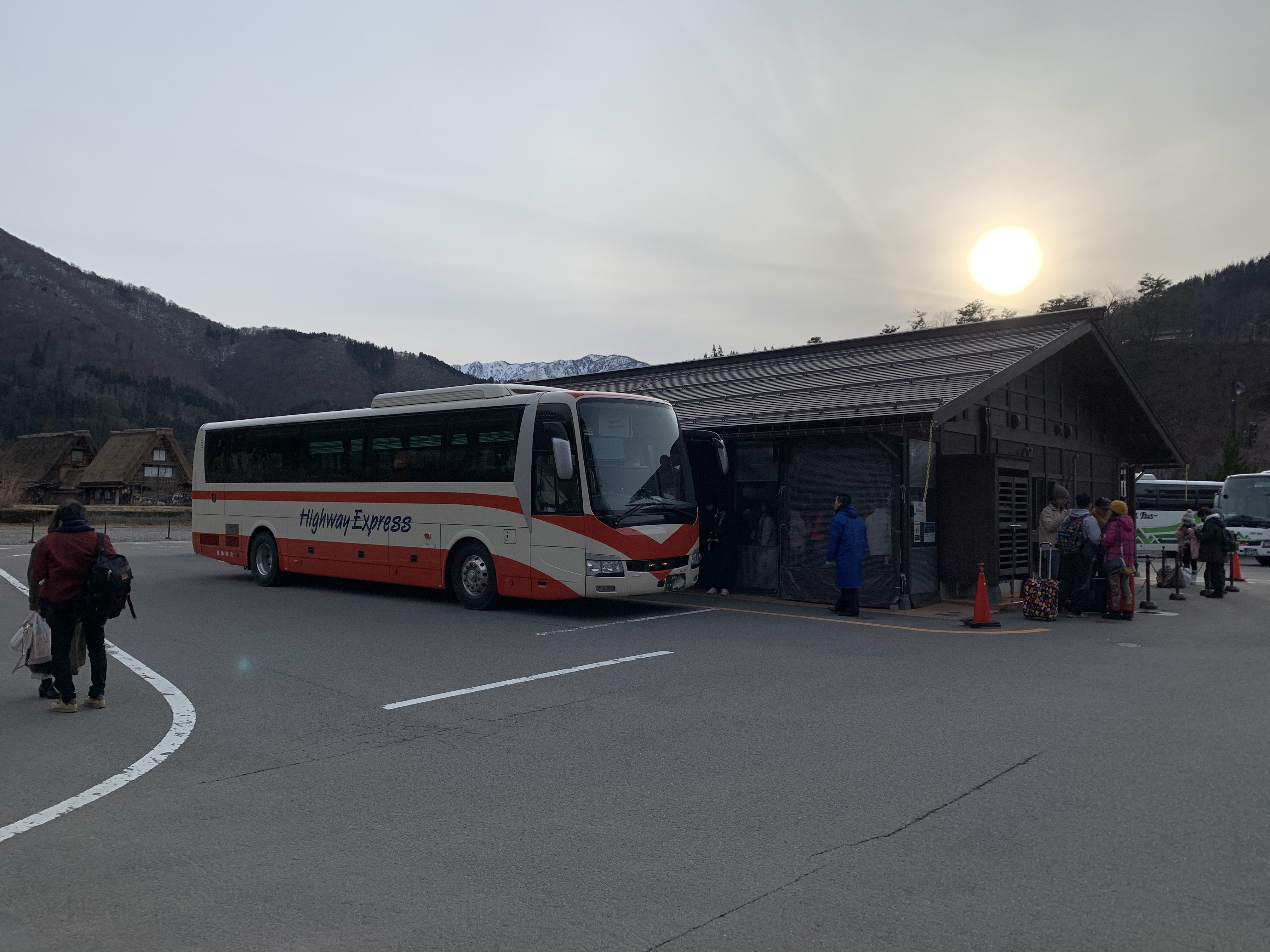 白川鄉巴士總站景觀。